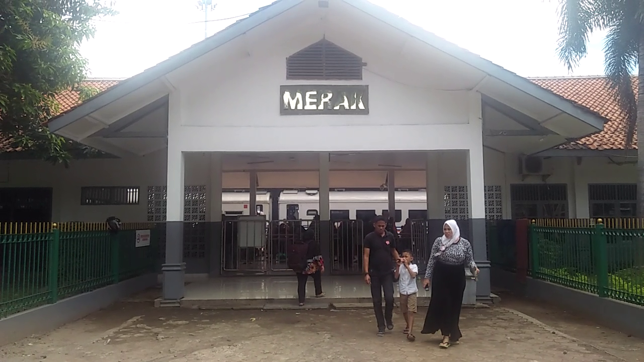 Pintu masuk Stasiun Merak tahun 2019